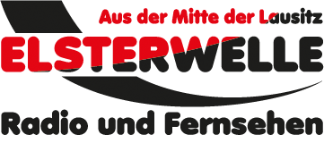 Logo der Elsterwelle